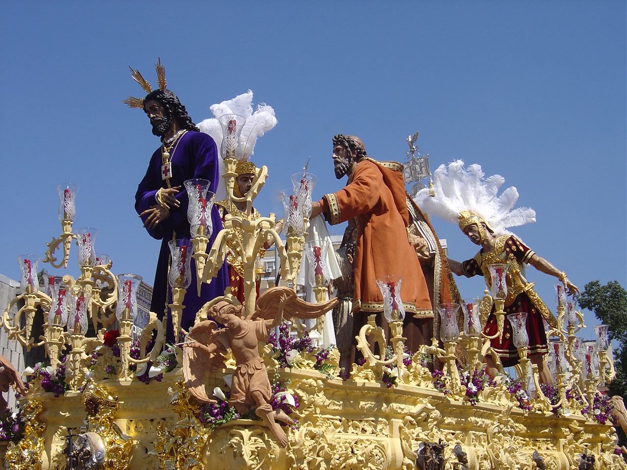 Paso de misterio de la Hermandad del Poligono de San Pablo (Sevilla) realizado por el imaginero Luis Álvarez Duarte.